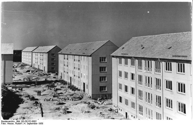 Hoyerswerda, Wohnblocks Zentralbild Hesse 4.9.1958 über 500 Wohnungen noch in diesem Jahr bezugsfertig In der im Bau befindlichen sozialistischen Wohnstadt Hoyerswerda werden noch in diesem Jahr 11 Wohnblocks mit insgesamt 544 Wohnungseinheiten bezugsfertig. 7 Wohnblöcke werden 1958 noch im Rohbau fertiggestellt. UBz: Blick auf vier neue Wohnblöcke, die in Großplattenbauweise entstanden.